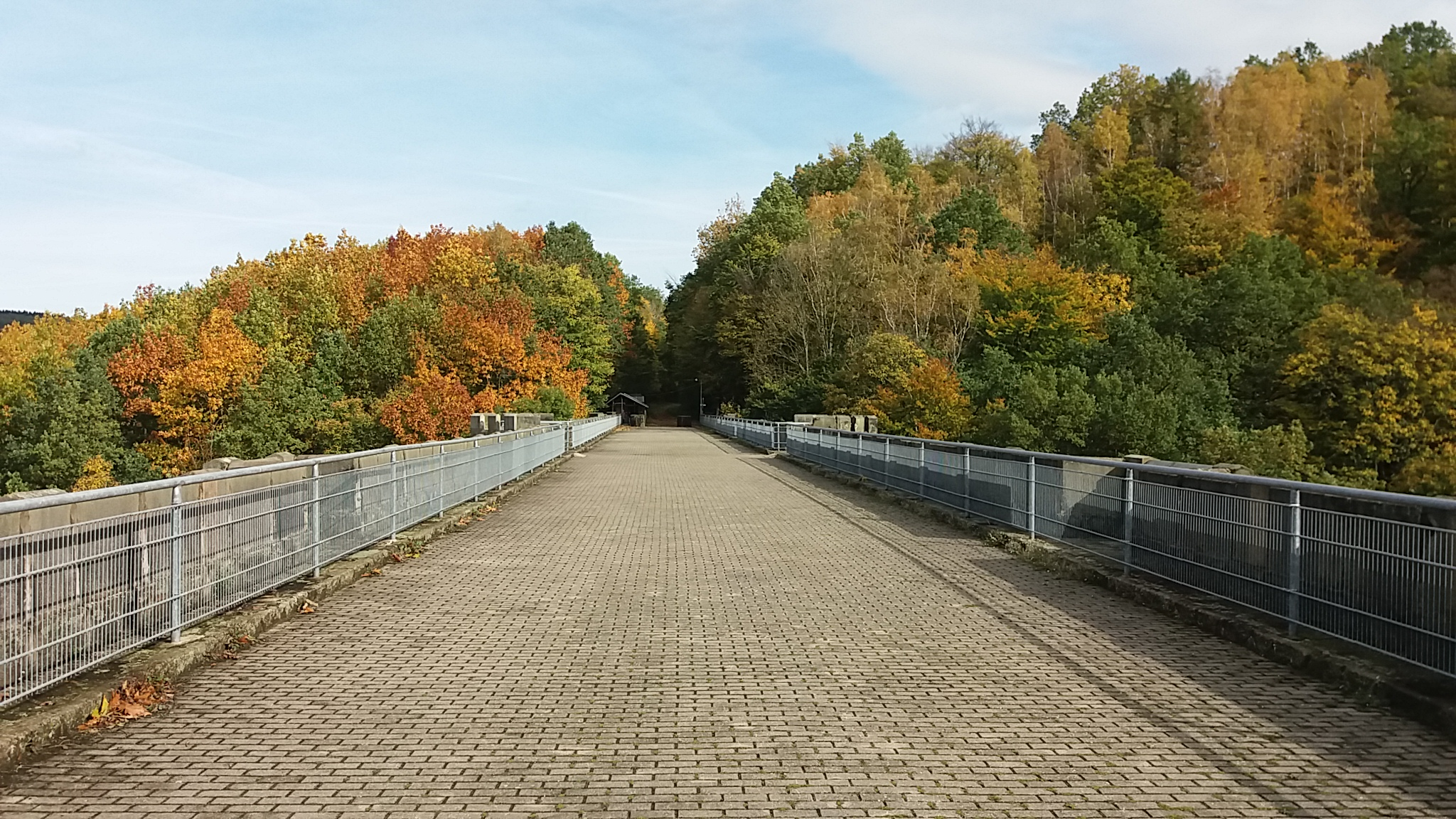 In Betonpflaster ausgeführter Wanderweg auf dem Hetzdorfer Viadukt; Blick etwa von Brückenmitte Richtung Norden